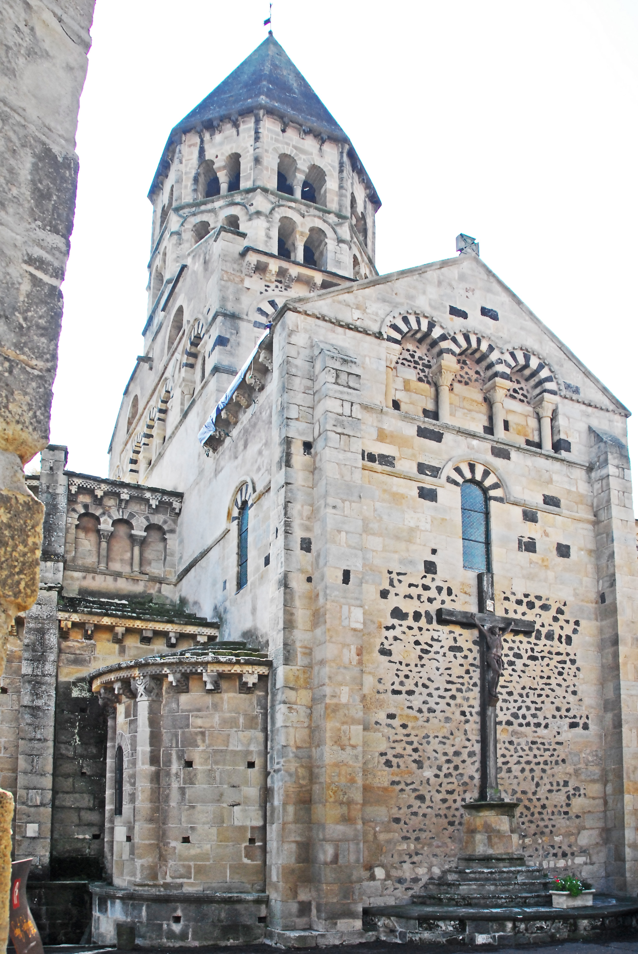 St-Saturnin Puy-de-Dôme), Querhaus von NO